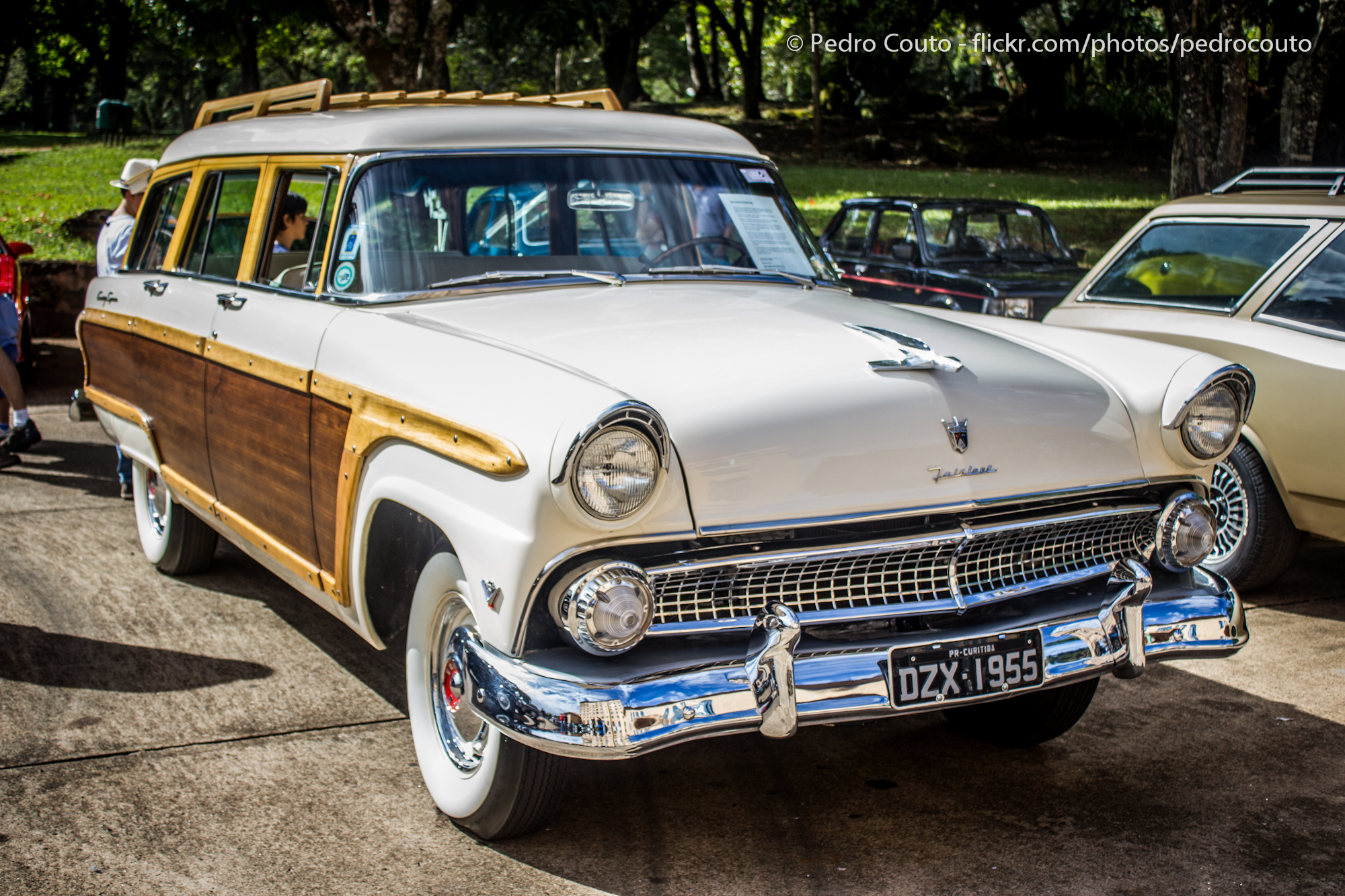 XX Encontro Nacional de Carros Antigos - Araxá MG